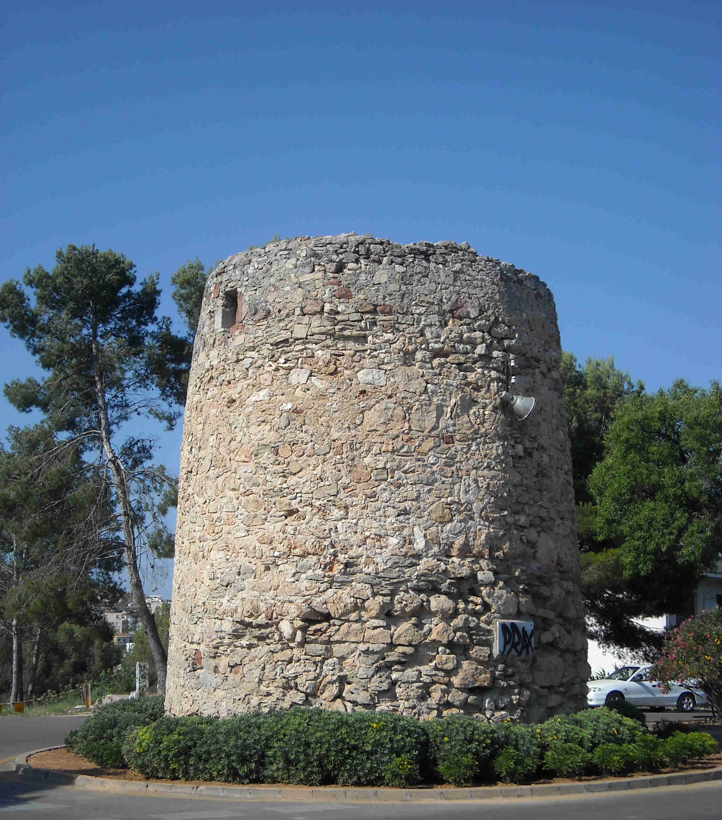 Al final de la Av. Manel Girona en la ciudad de Castelldefels nos encontramos en la plaza del Castell con la parte conservada de una de las antiguas torres de vigía, la Torre de Guaita, de forma circular (siglo X u XI). En el lado sur de esta y al otro lado de la calle la entrada al Castell de Fels que tuvo su origen en la antigua iglesia de Santa María.